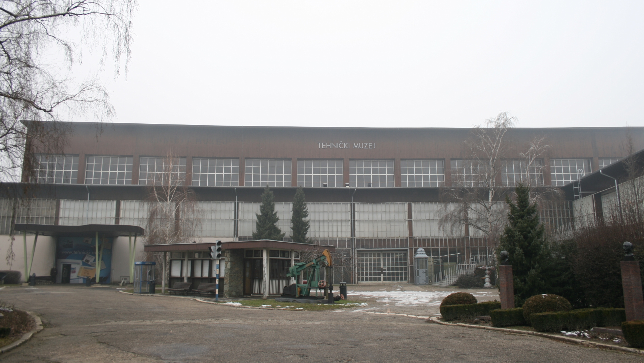 zgrada Tehničkog muzeja u Zagrebu